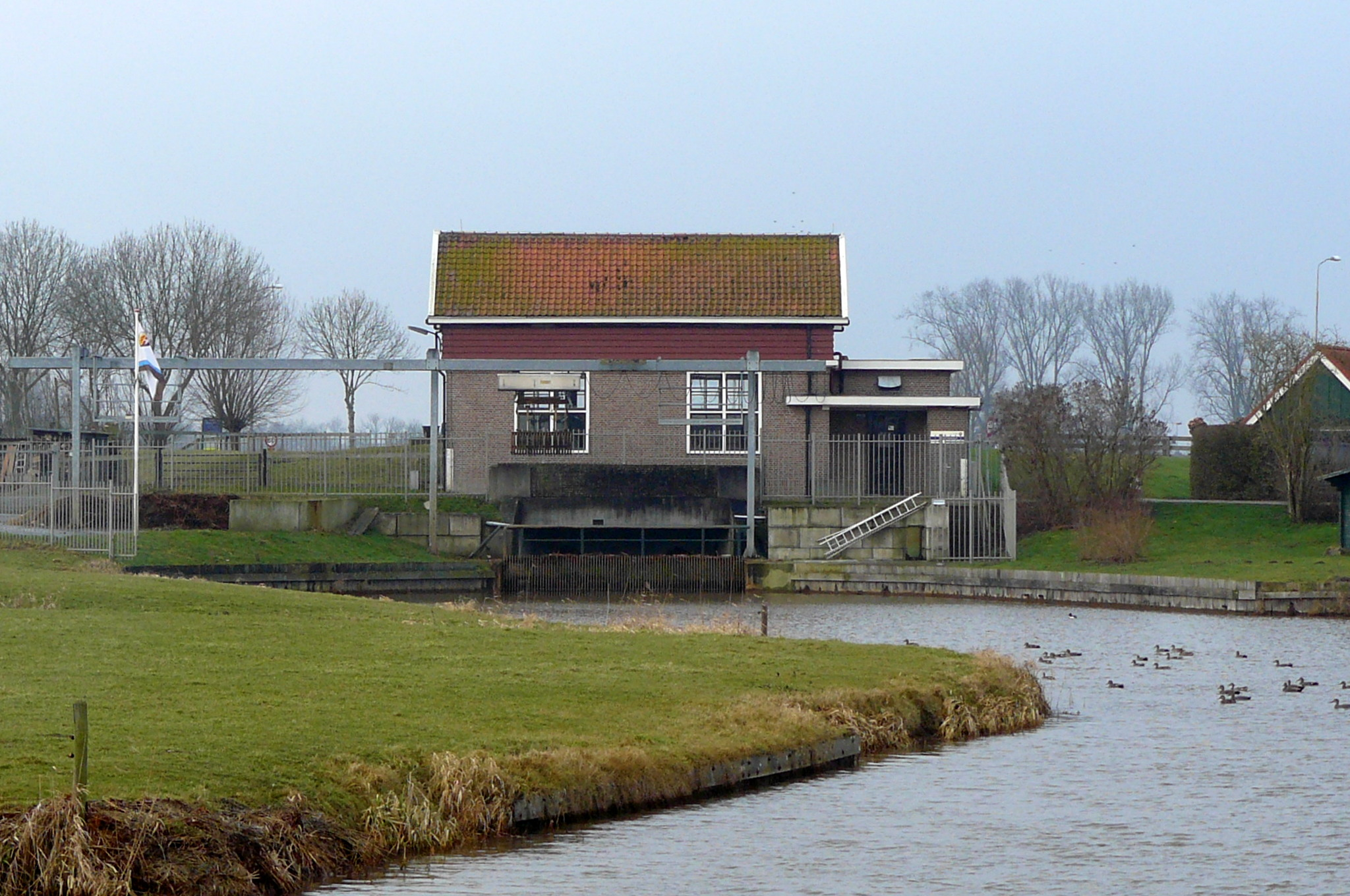 Het gemaal Hostermeerpolder gezien vanuit de polder.